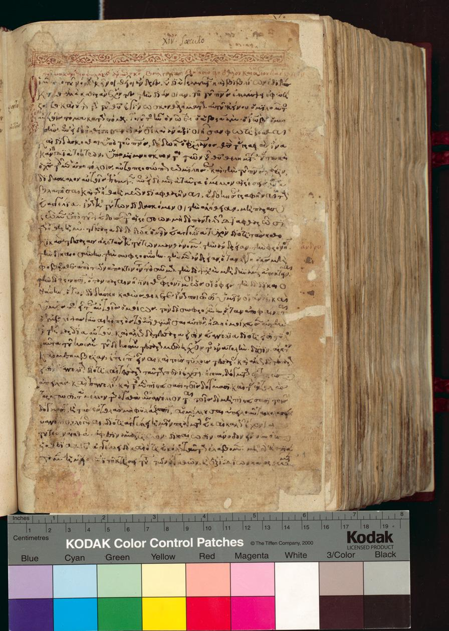 Folio 1 recto